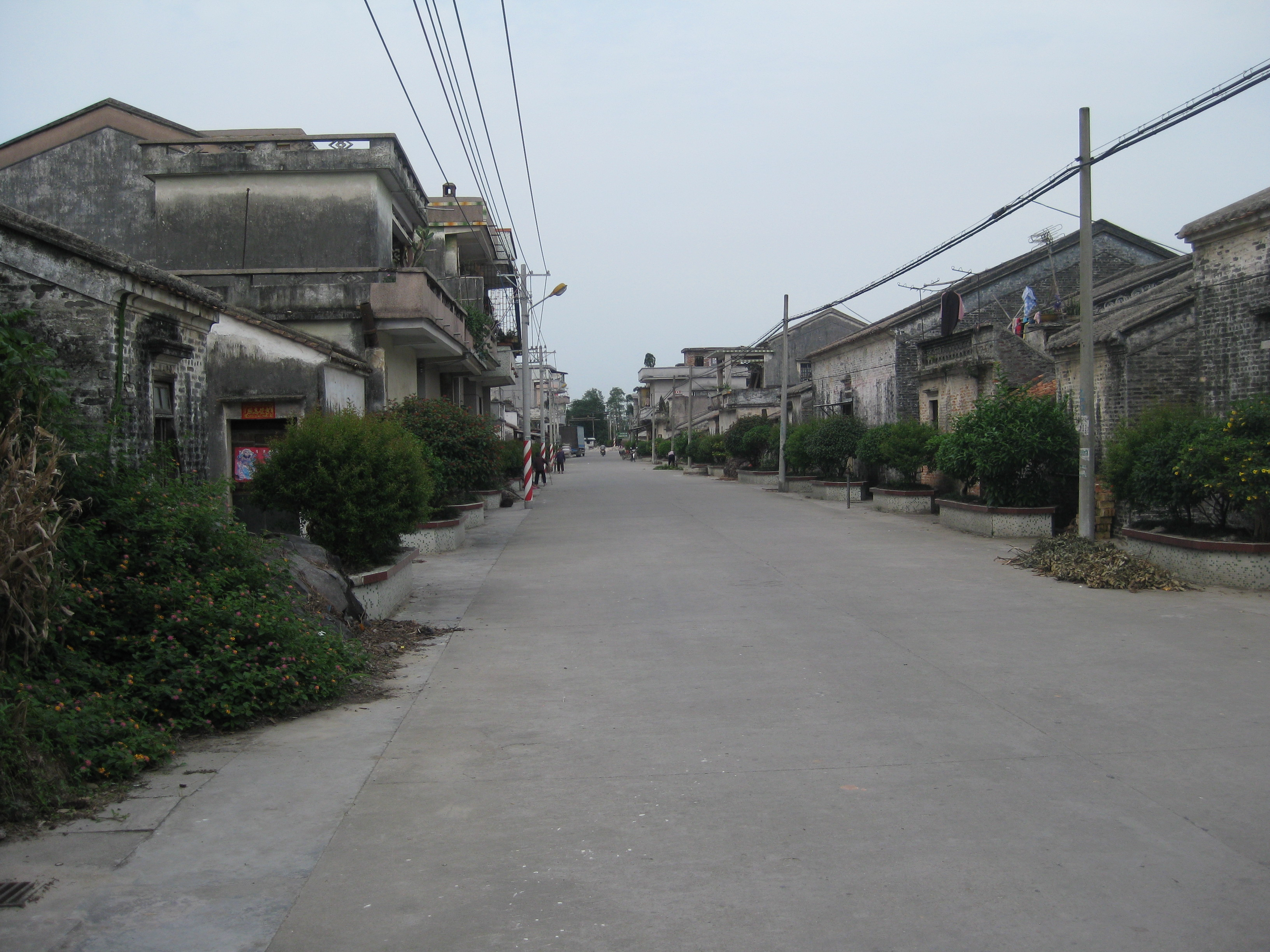 潭冈街景